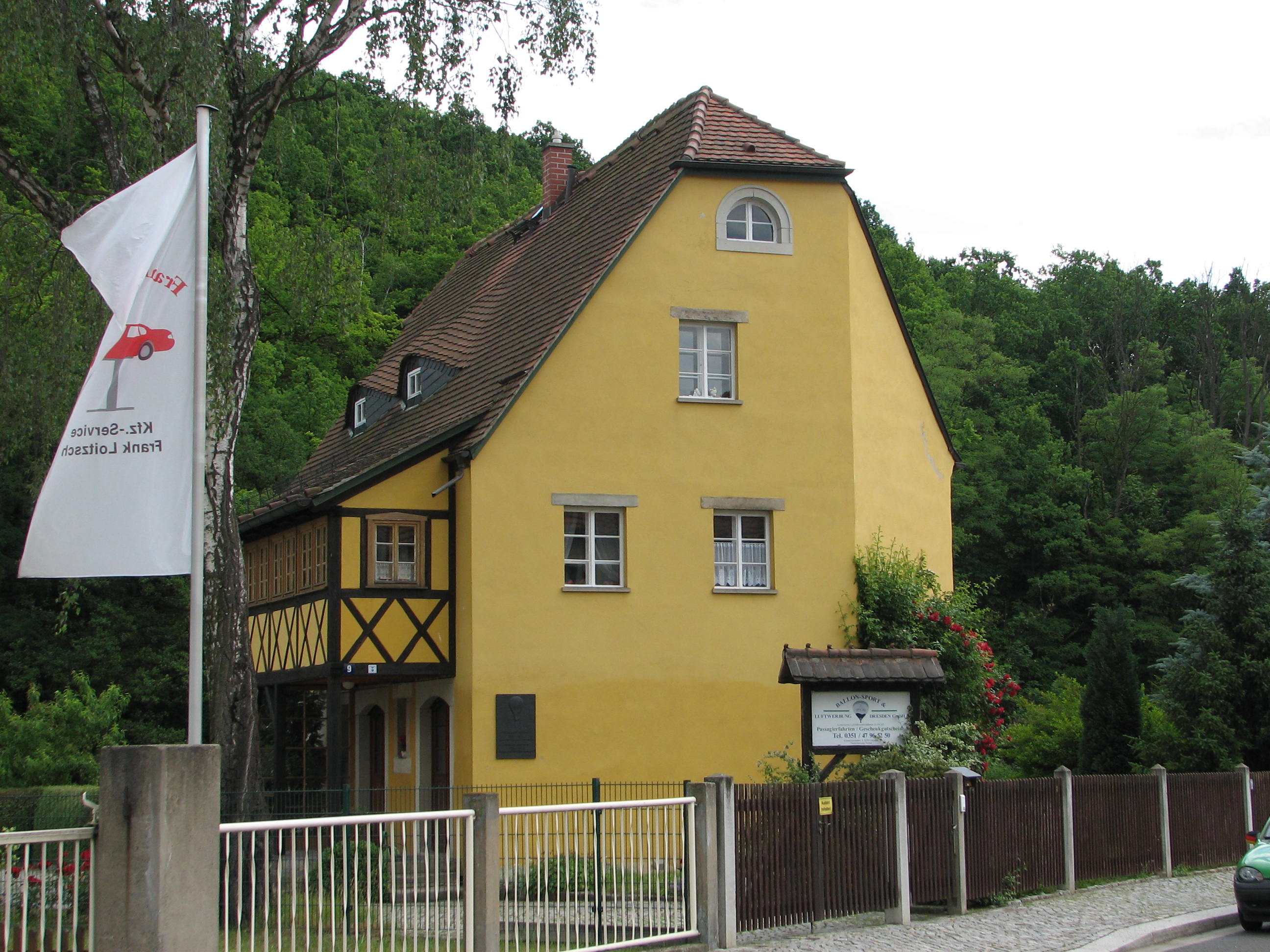 Ballonfahrerhaus, Wohnhaus der ersten Ballonfahrerin Deutschlands, Wilhelmine Reichard, an der Weißeritz in Freital-Döhlen. Erstmals beschädigt wurde das Haus durch die Flut 1897; die Abschrägung ist eine Folge davon. Ab 1950 begann der Verfall, der ab 1960 durch Reparaturen aufgehalten wurde. Ab Mitte 1990 erschien ein Erhalten des Gebäudes unmöglich. Günter Siebert, ein engagierter Stadtrat, verhinderte den Abbruch und gewann einen Ballonfahrer, der das Haus auch unter Zuhilfenahme öffentlicher Mittel wieder restaurierte. Südlich des Hauses war die Vitriol- und Schwefelsäurefabrik von Gottfried Reichard, des Ehemanns von Wilhelmine Reichard.